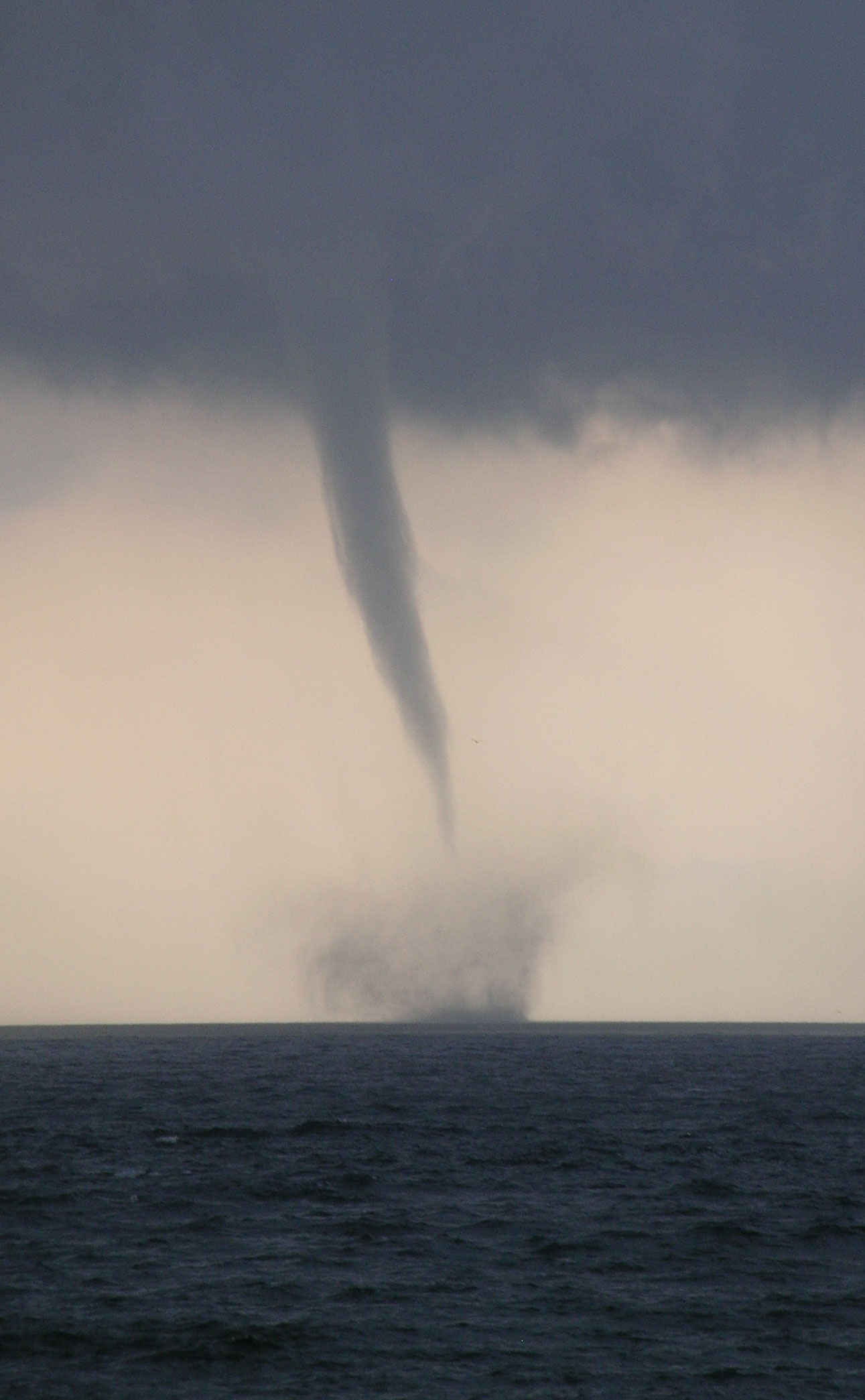 Водяной смерч - 6 августа 2010 Будва, Черногория, Адриатика. Вид с плажа Могрен-2.